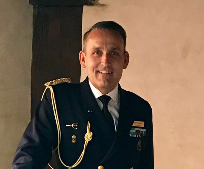 Peder Ohlsson